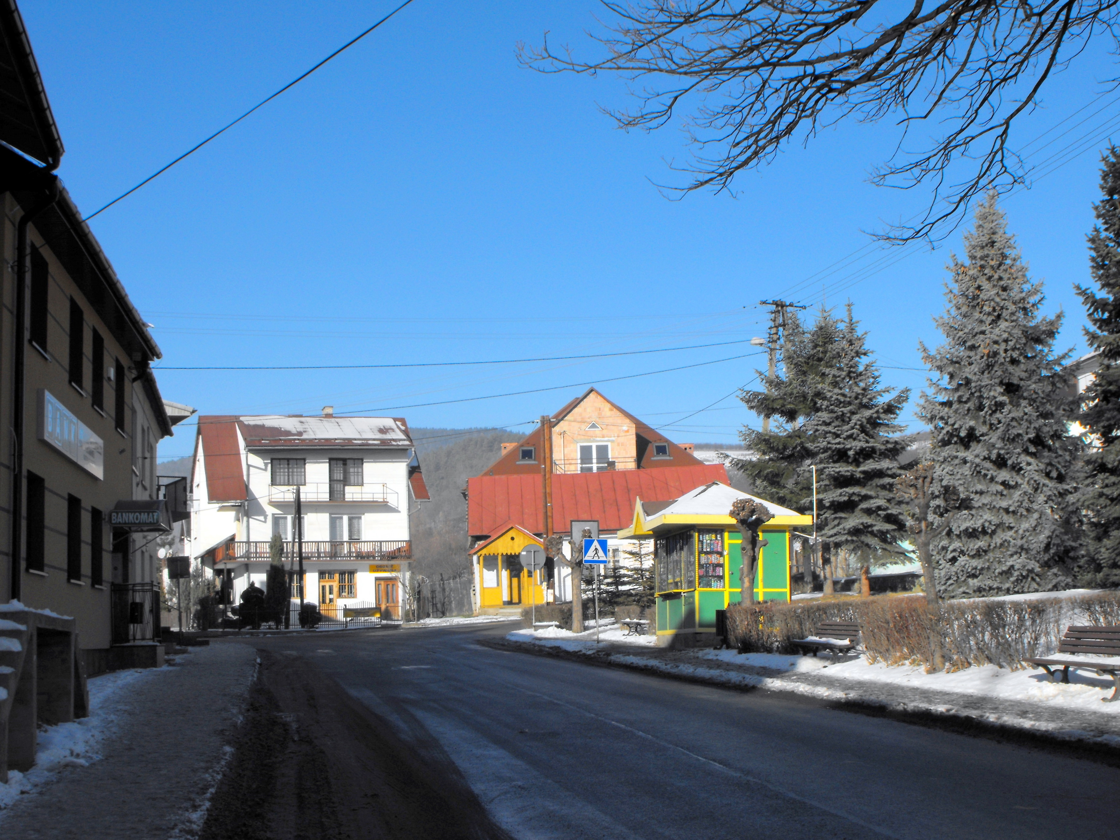 zdjęcie pokazuje część rynku w Łukowicy